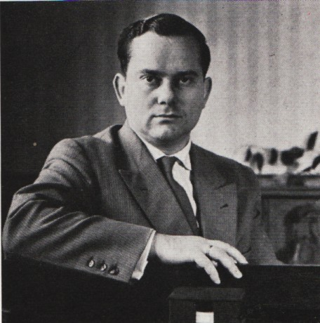 Portrait von Gerd Mohn aus dem Jahr 1959